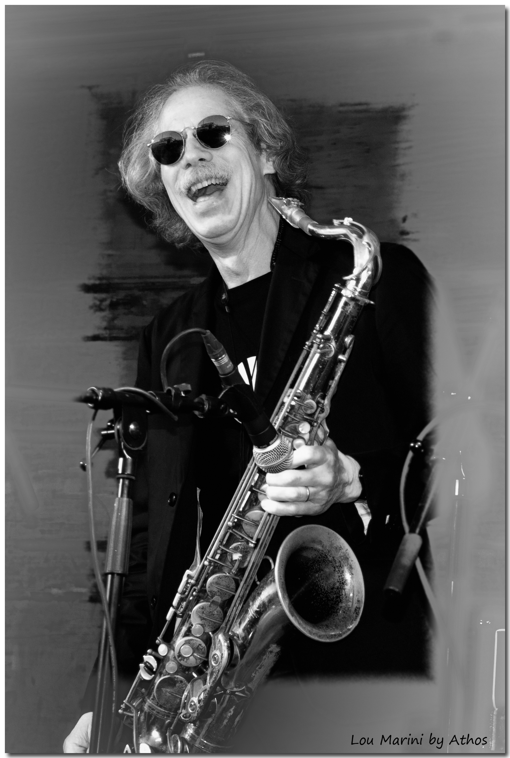 Lou Marini en Alcorcón (Madrid) by Athos